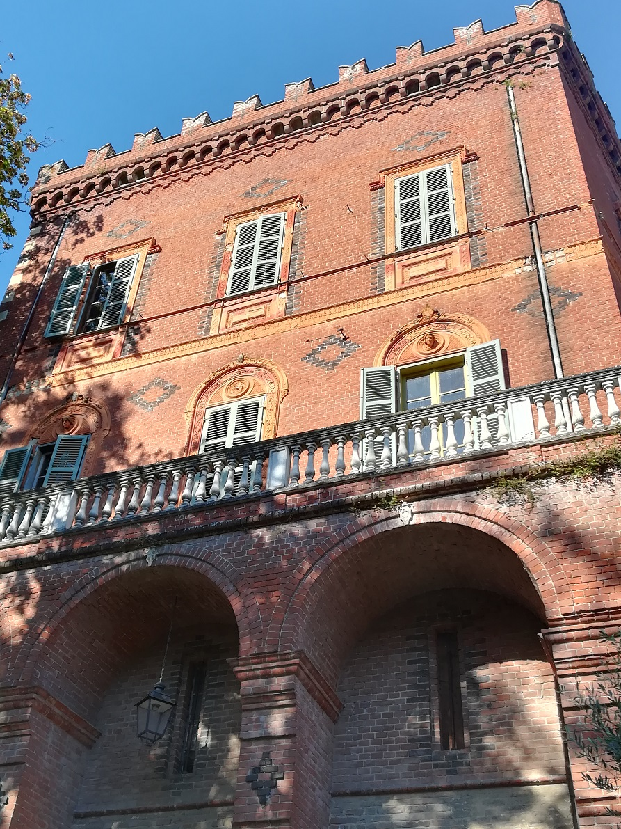 Facciata meridionale del Castello di Uviglie a Rosignano Monferrato